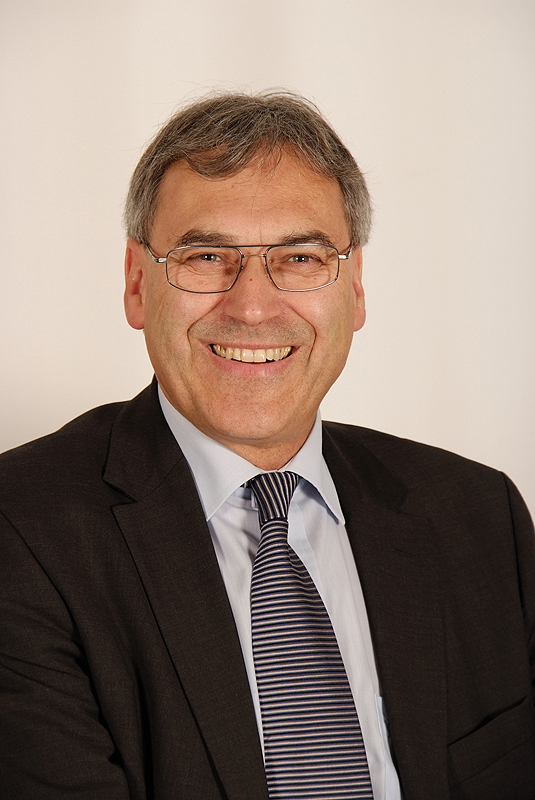 Karl-Heinrich Langspecht, Landtagsabgeordneter Niedersachsen, 16. Wahlperiode (Fotoprojekt Landtagsabgeordnete Niedersachsen am 24. und 25. November 2009)